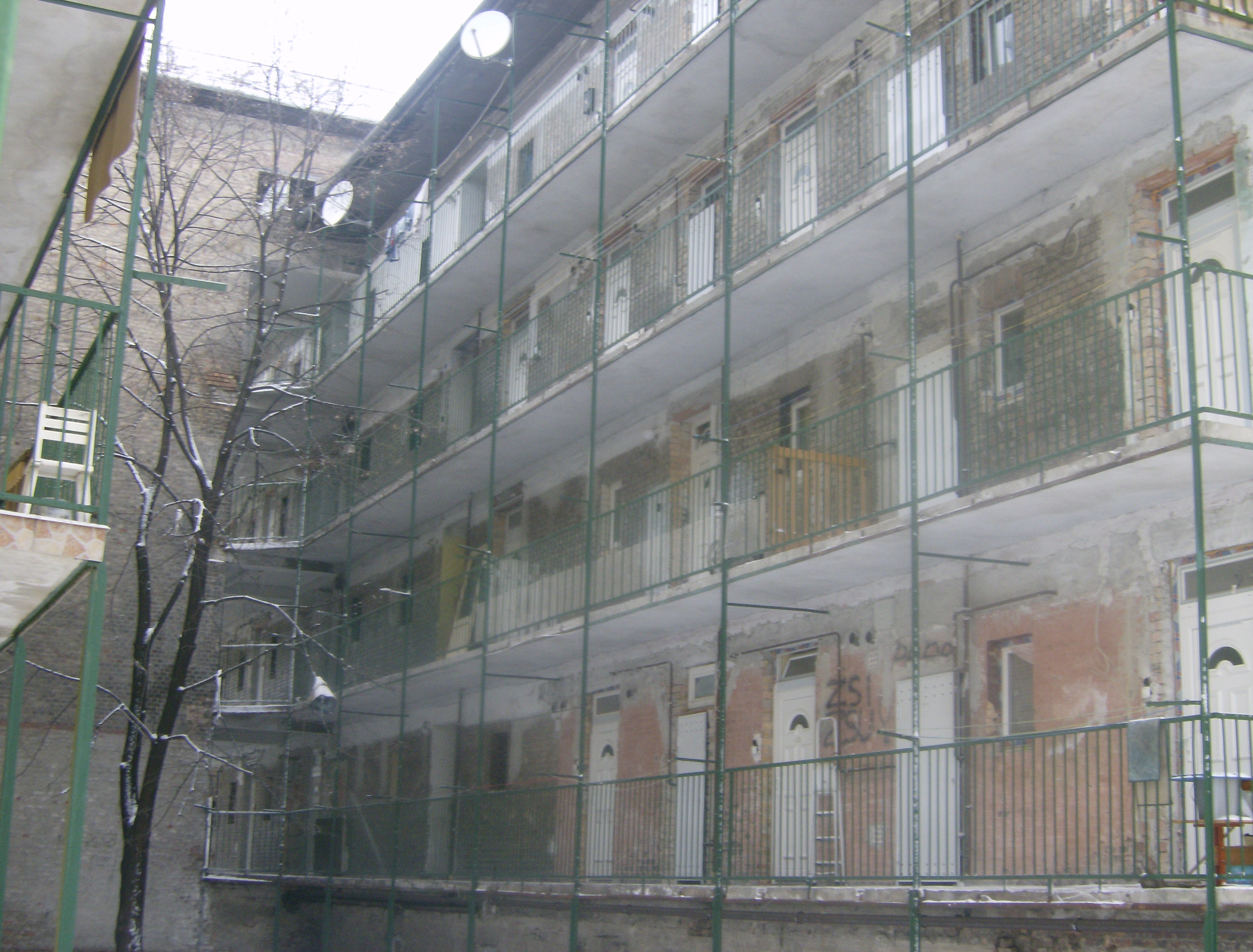 Budapest, Bihari út 8/c, szükséglakások 1932-ből, felújított oldal